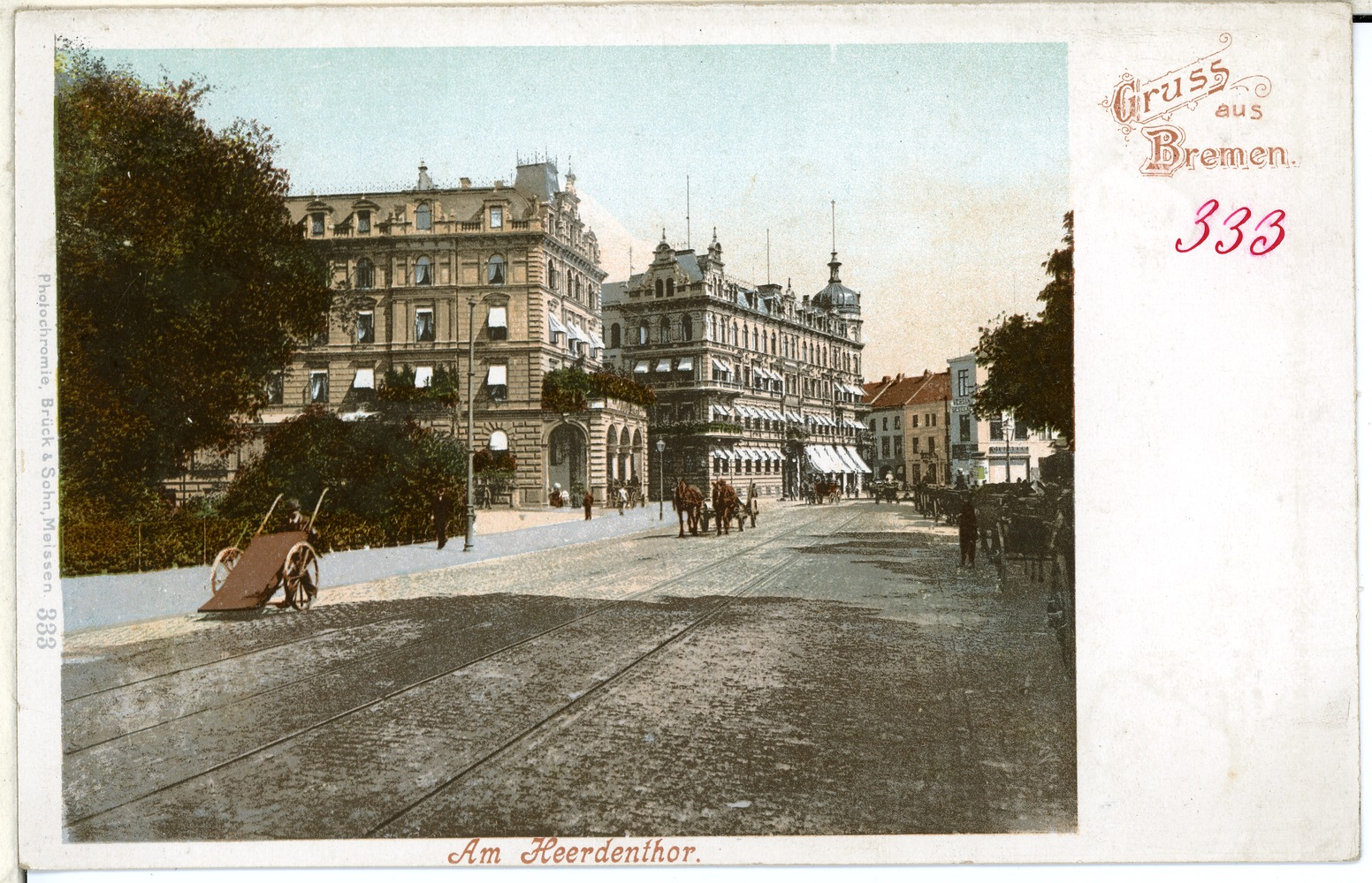 Bremen; Am Heerdenthor (heute Bezeichnung: Herdentor; heutiger Straßenname: Herdentorsteinweg) im Jahr 1908; mit den damaligen Luxushotels Hillmann (links), Umbau entworfen von Architekt Heinrich Müller, und Europa (rechts). This postcard is from publisher Brück & Sohn in Meißen ( postcard has a unique number 00333 and is available in a higher resolution at the publisher. This images was uploaded in a cooperation project between Wikipedians and the publisher.